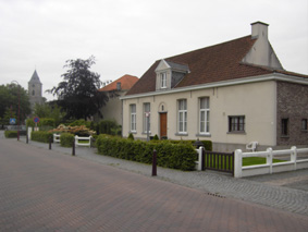 Description Bellem dorp. Achter deze woning startte Brouwerij Meiresonne in 1866, nabij de kerk van Bellem. Nadien werd er gewerkt in Landegem om in Gent uit te groeien tot een grote brouwerij. Date04/06/2006SourceOwn workAuthorspotterPermission (Reusing this file) eigen foto Bellem dorp. Achter deze woning startte Brouwerij Meiresonne in 1866, nabij de kerk van Bellem. Nadien werd er gewerkt in Landegem om in Gent uit te groeien tot een grote brouwerij.